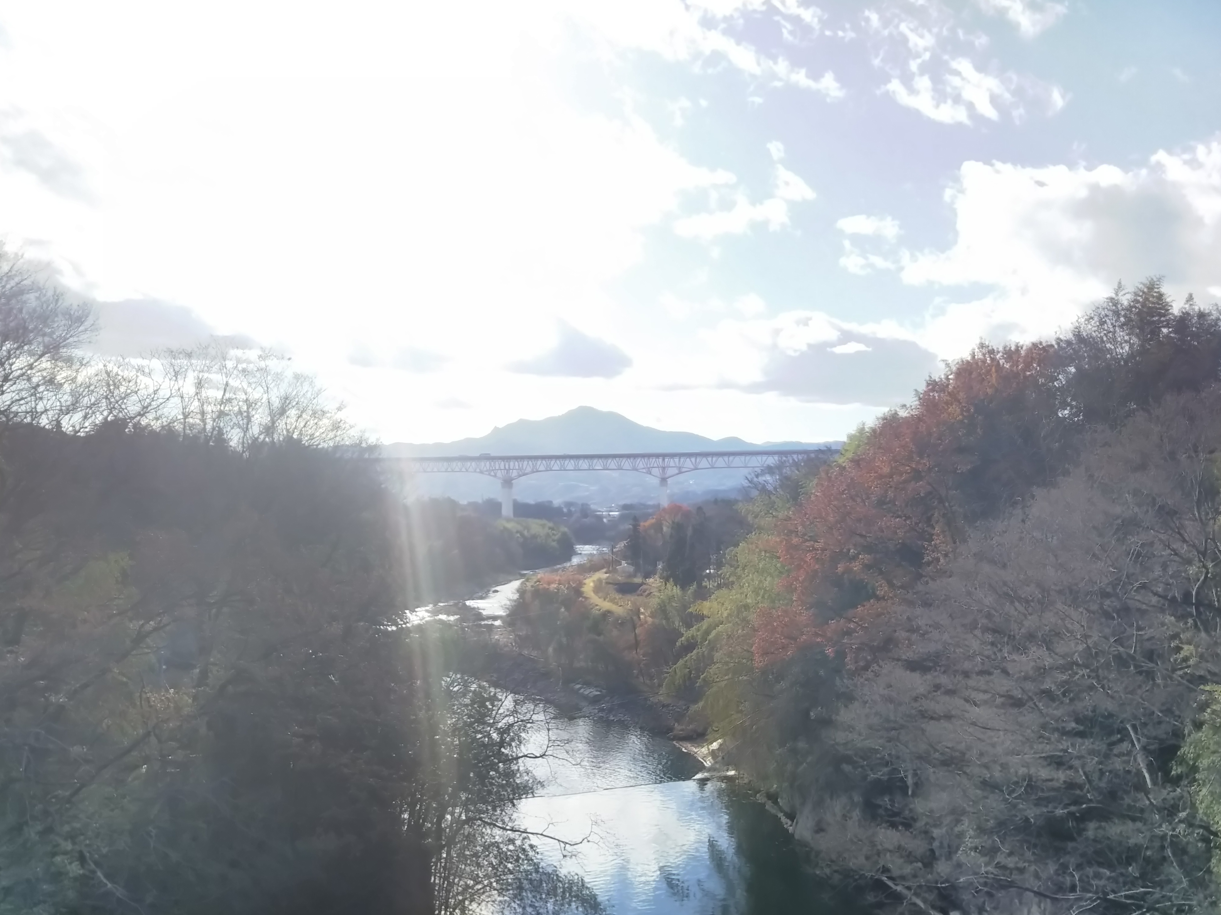 群馬県沼田市と昭和村の間の片品川に架かる、関越自動車道片品川橋。東側（片品川上流側）より